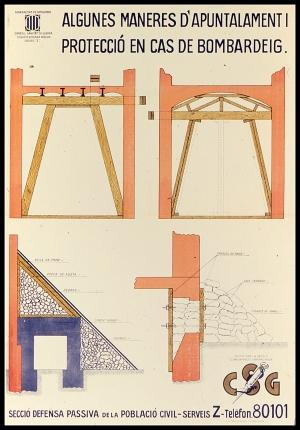 Algunes maneres d'apuntalament i protecció en cas de bombardeig. Cartell de 1937 durant la Guerra Civil Espanyola